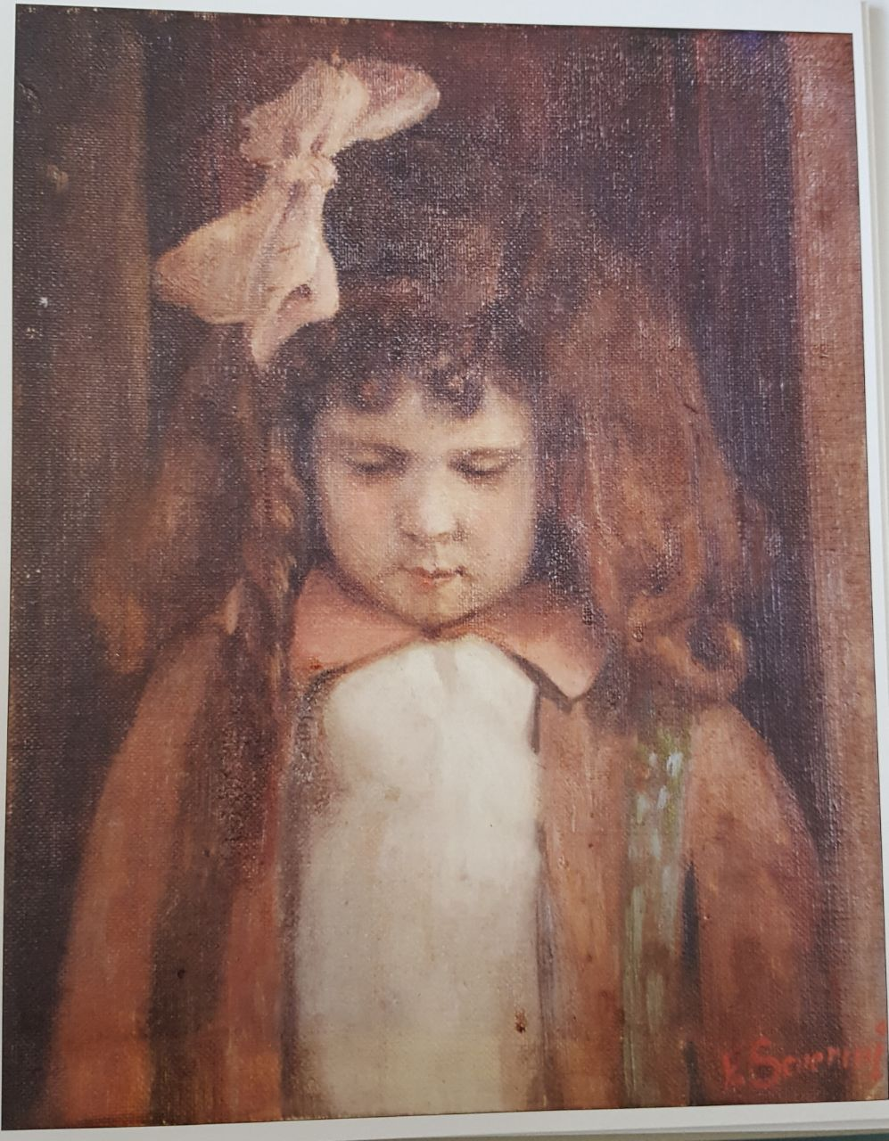 "La mia bimba" di Federigo Severini